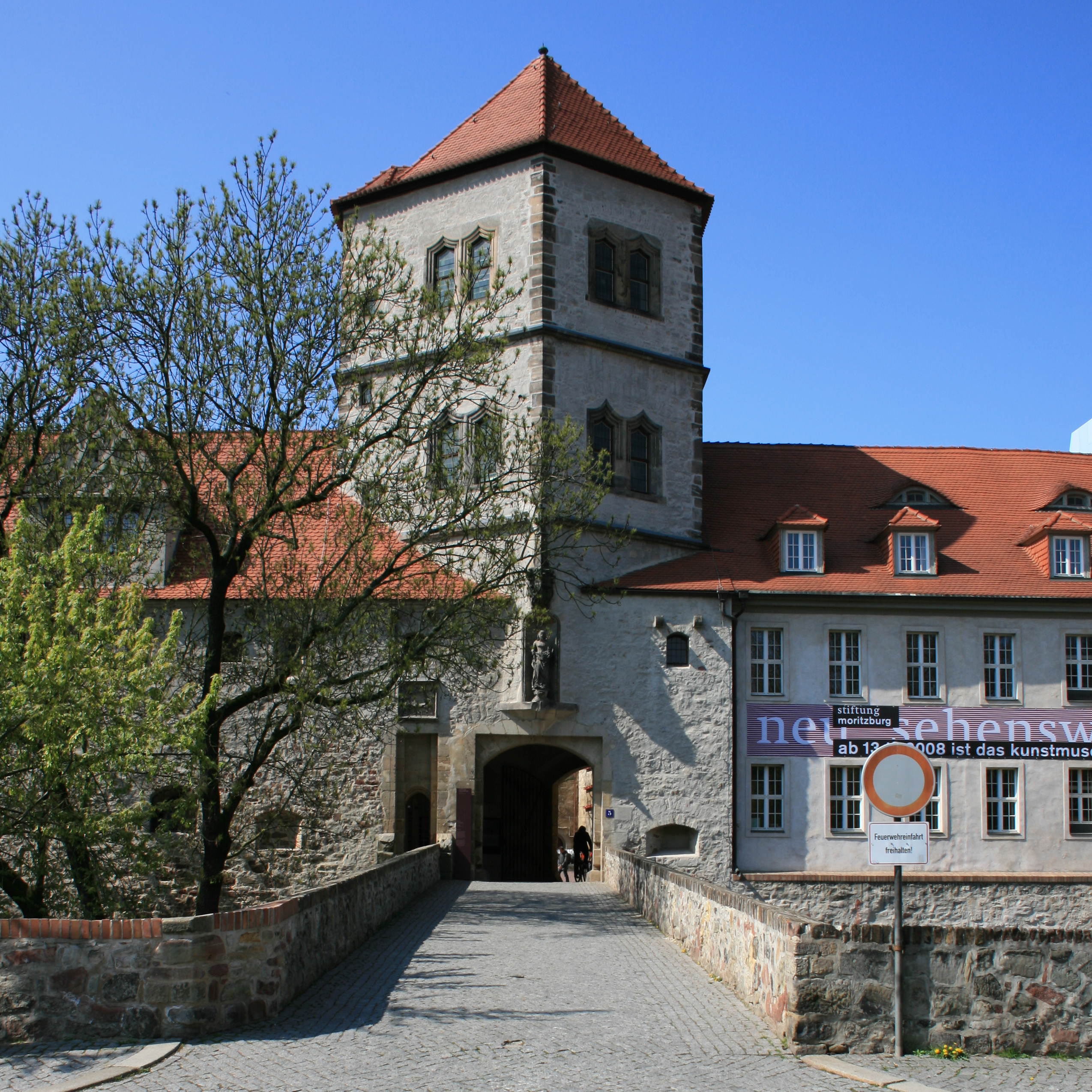 Eingang der Moritzburg in Halle (Saale)